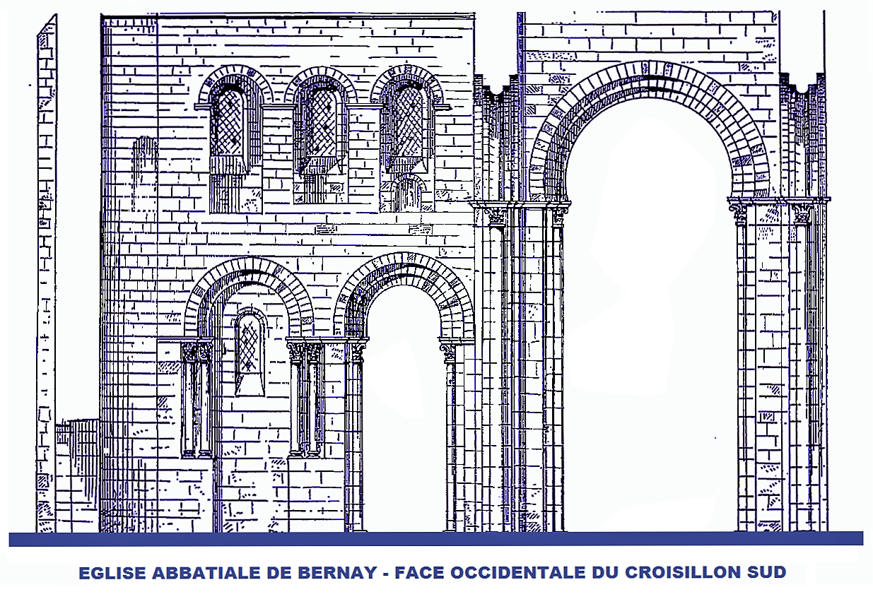 Abbaye de Bernay, face occidentale du croisillon sud (image du domaine public modifiée, Congrès archéologique de Caen, 1909)